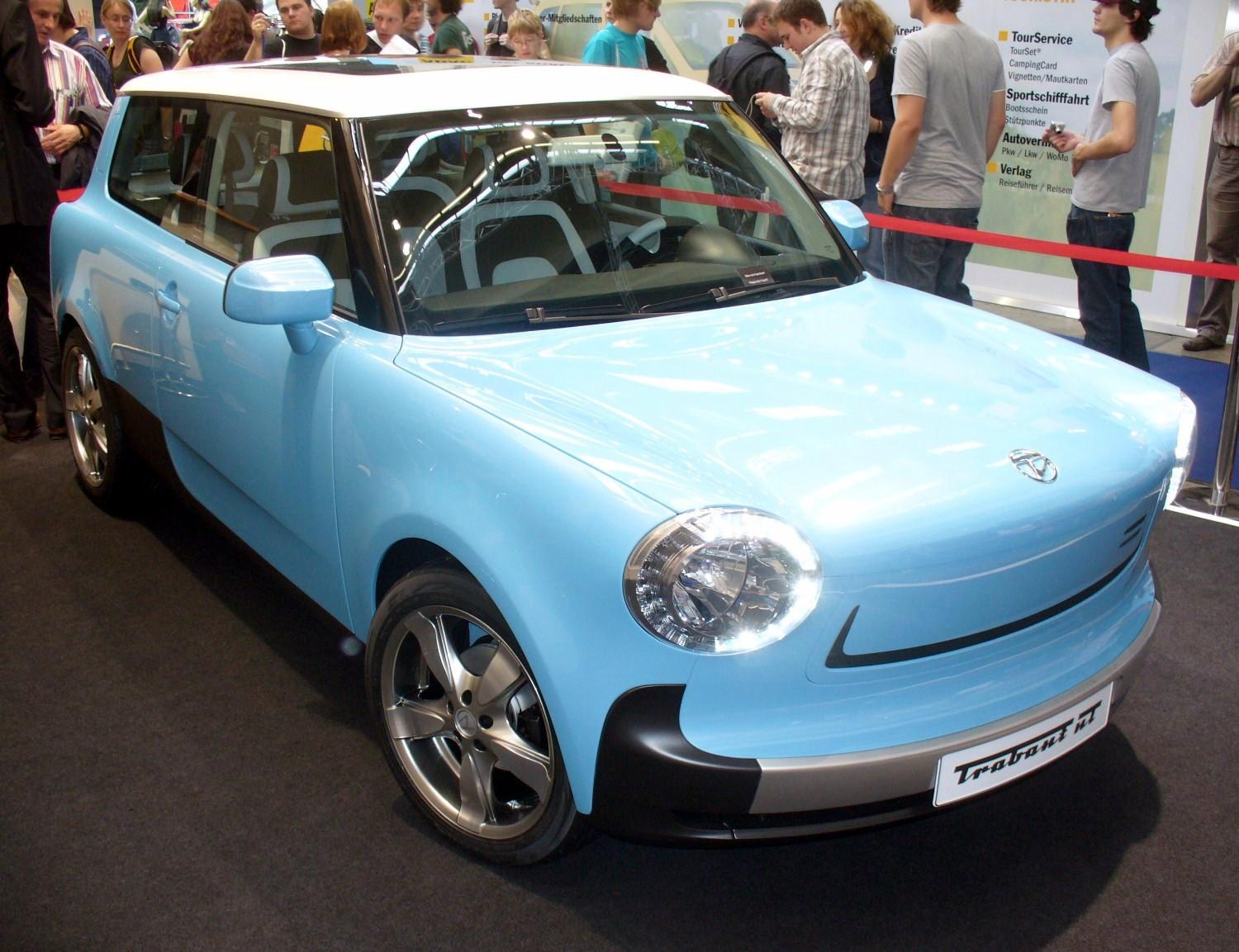 Trabant nT